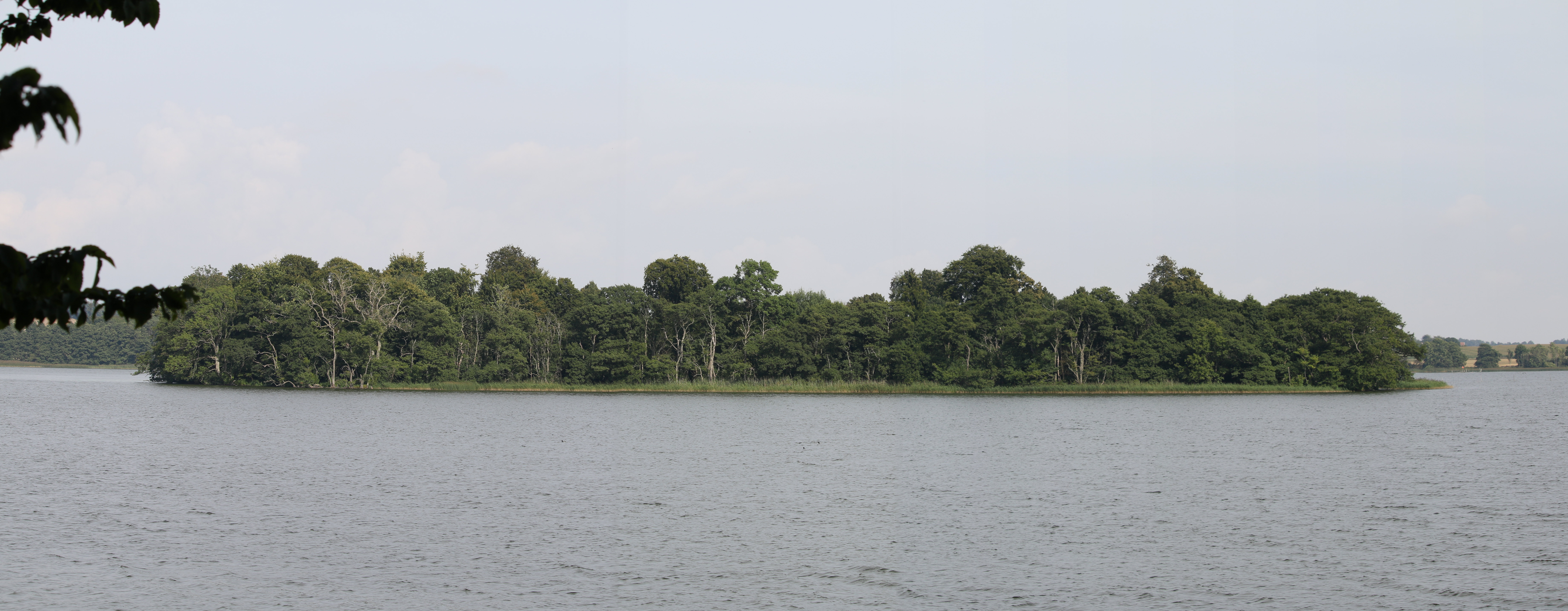 Naturreservatet Lybeck i Krageholmssjön